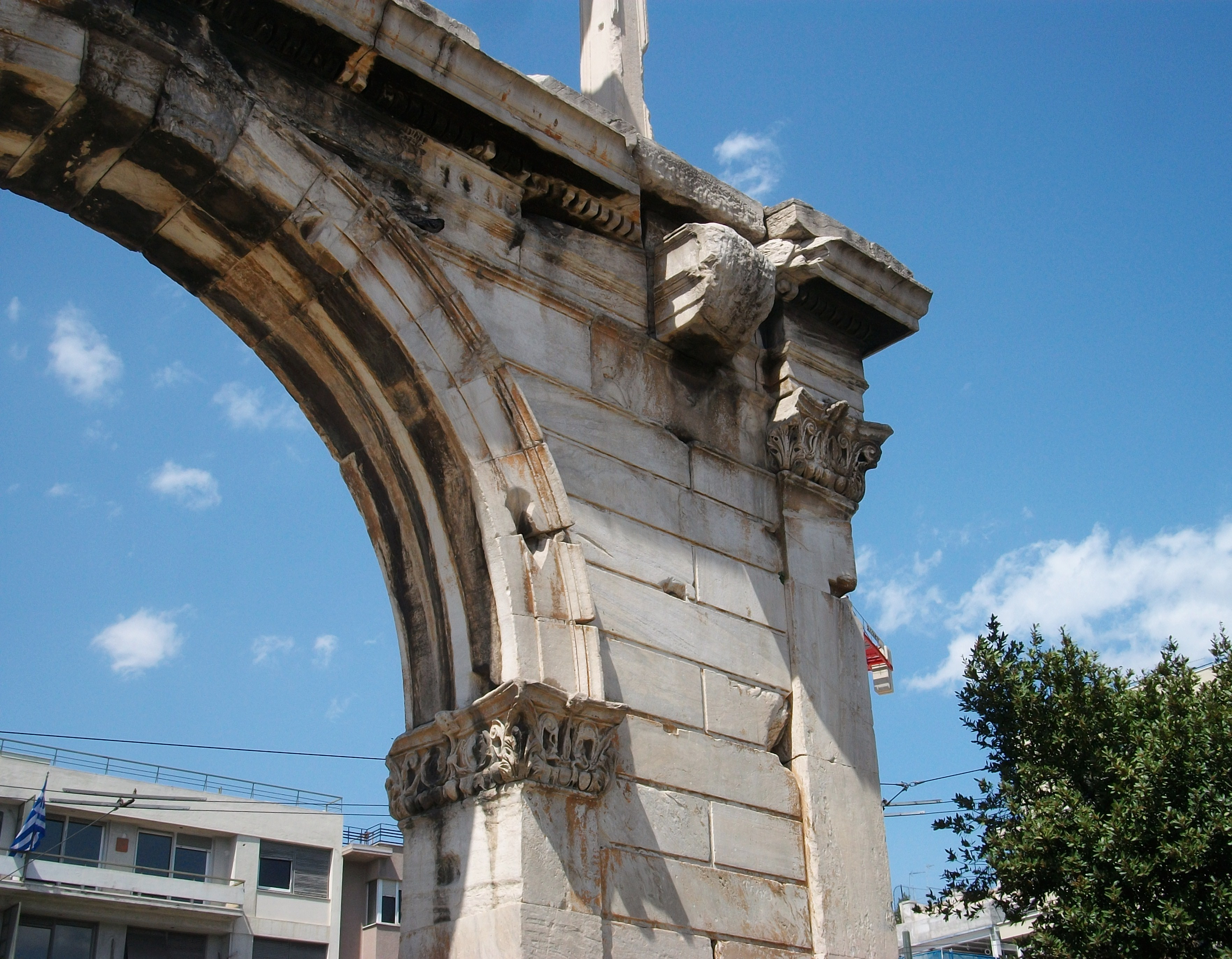 Arc d'Adrià d'Atenes, detall.